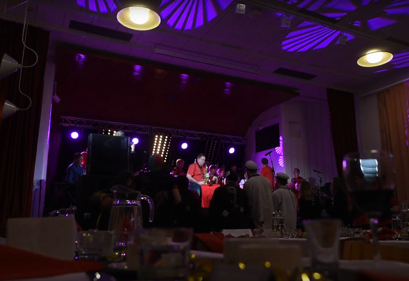 Axelbandet 25.3.2017